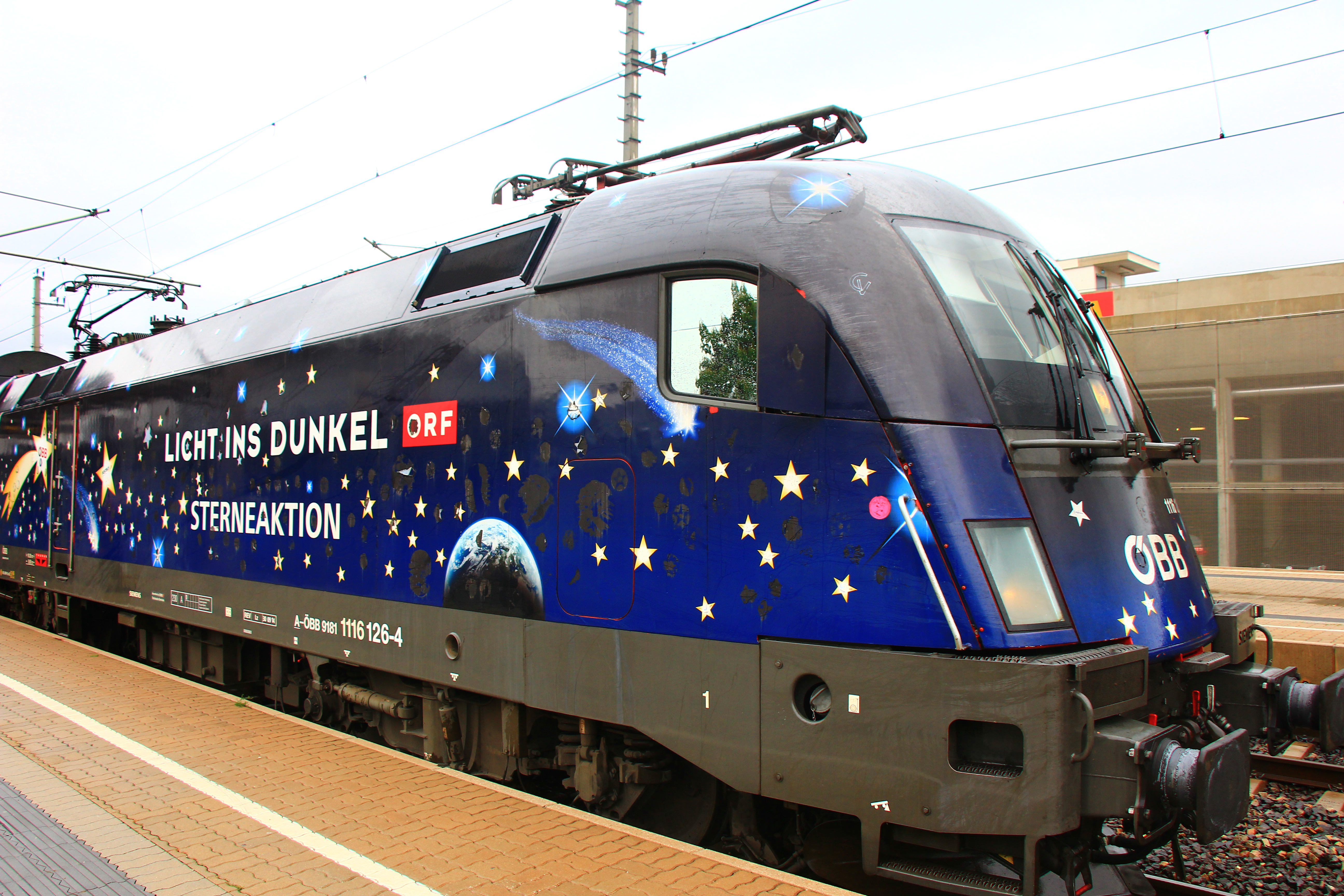 ÖBB 1116 mit Licht ins Dunkel-Beklebung im Bahnhof Mödling vor einem Regionalzug